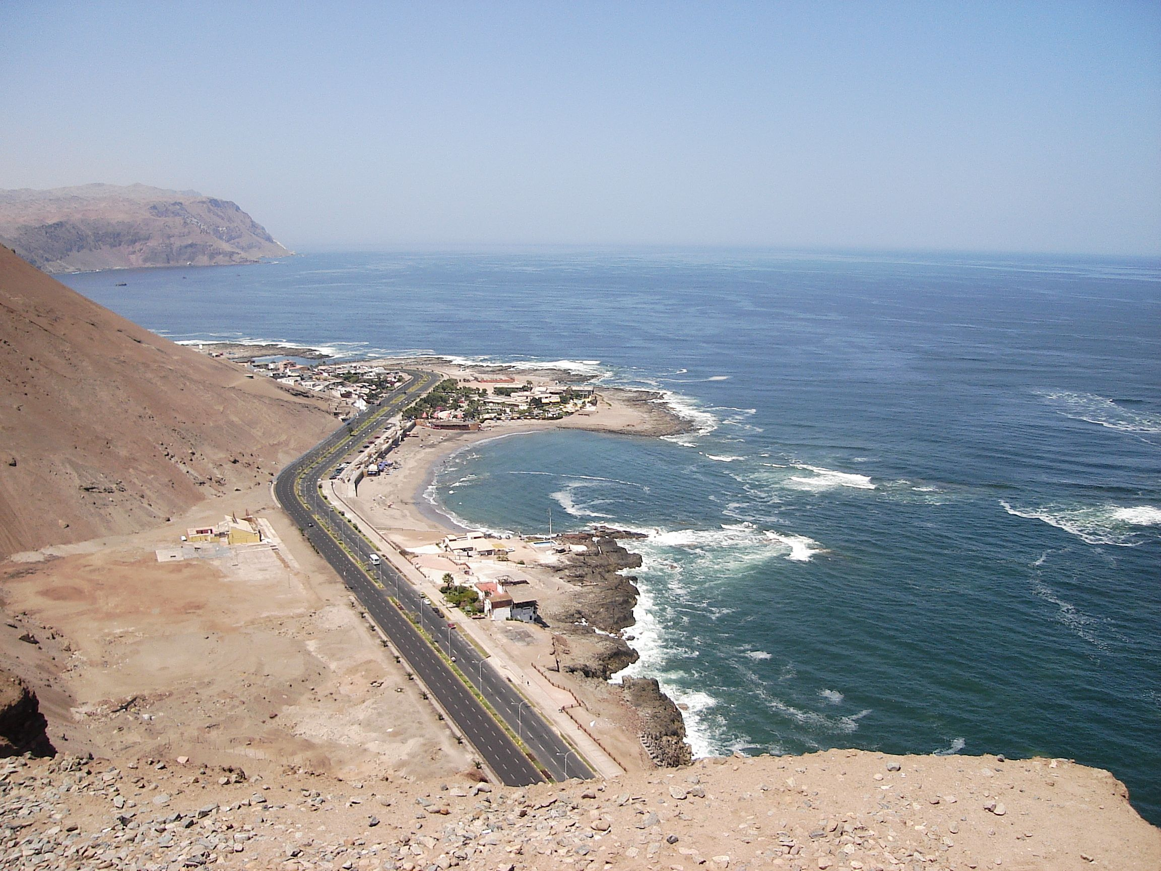 Foto tirada por mim, em Arica.